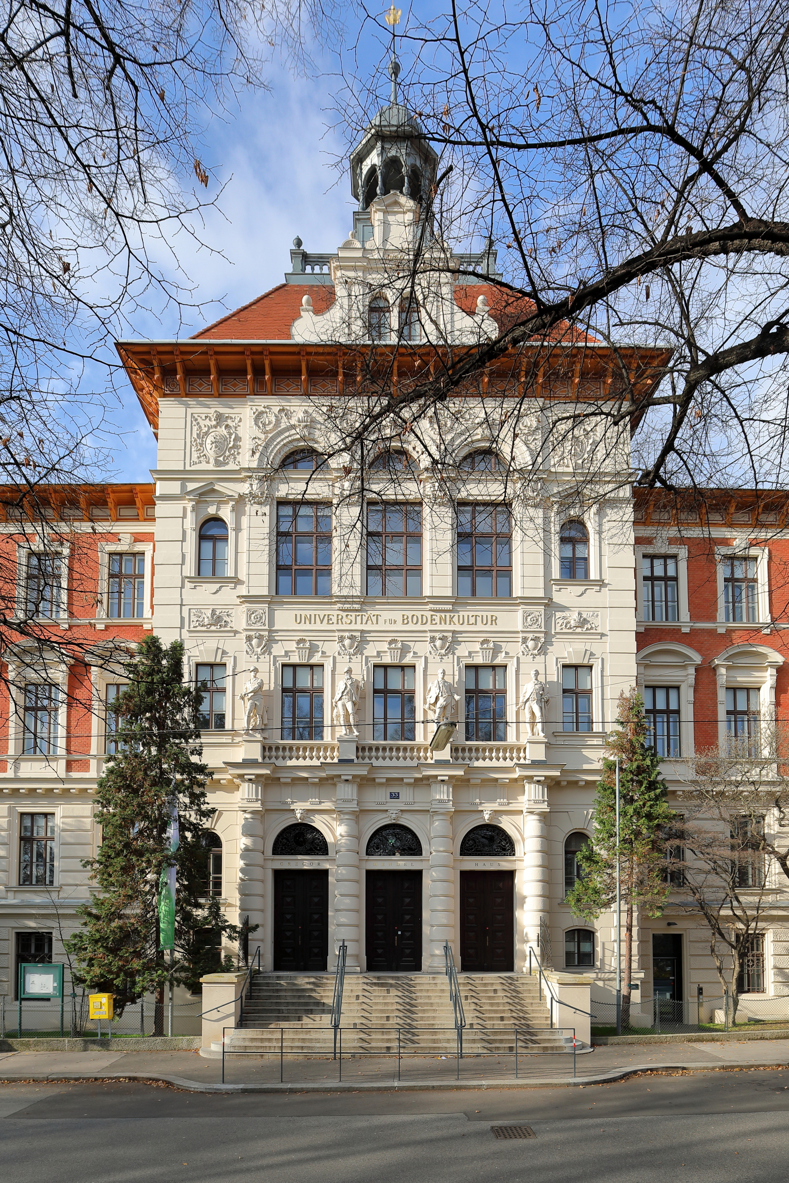 Das Hauptportal des Gregor-Mendel-Hauses (Hauptgebäude der Universität für Bodenkultur) im 18. Wiener Bezirk Währing.Der charakteristische Universitätsbau der späten Gründerzeit wurde ab 1894 nach Plänen von Alois Koch errichtet und am 5. Dezember 1896 feierlich eröffnet. 1960 erfolgte die Benennung des Hauptgebäudes nach Gregor Mendel, gleichzeitig wurde das Chemiegebäude (axial in die Mitte des nach rückwärts offenen Hofs des Gregor-Mendel-Hauses positioniert und im Jahr 1978 mit den Flügeltrakten des Gregor-Mendel-Hauses verbunden) in Justus von Liebig-Haus umbenannt.